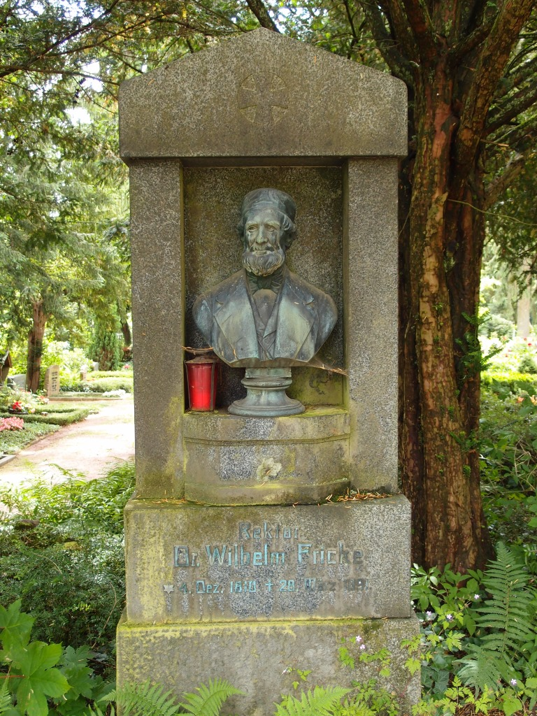 Grab des Schriftstellers Wilhelm Fricke, 1810-1891, auf dem Nordfriedhof in Wiesbaden